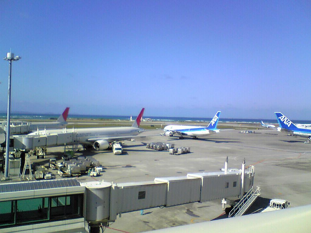 Naha International Airport, Okinawa